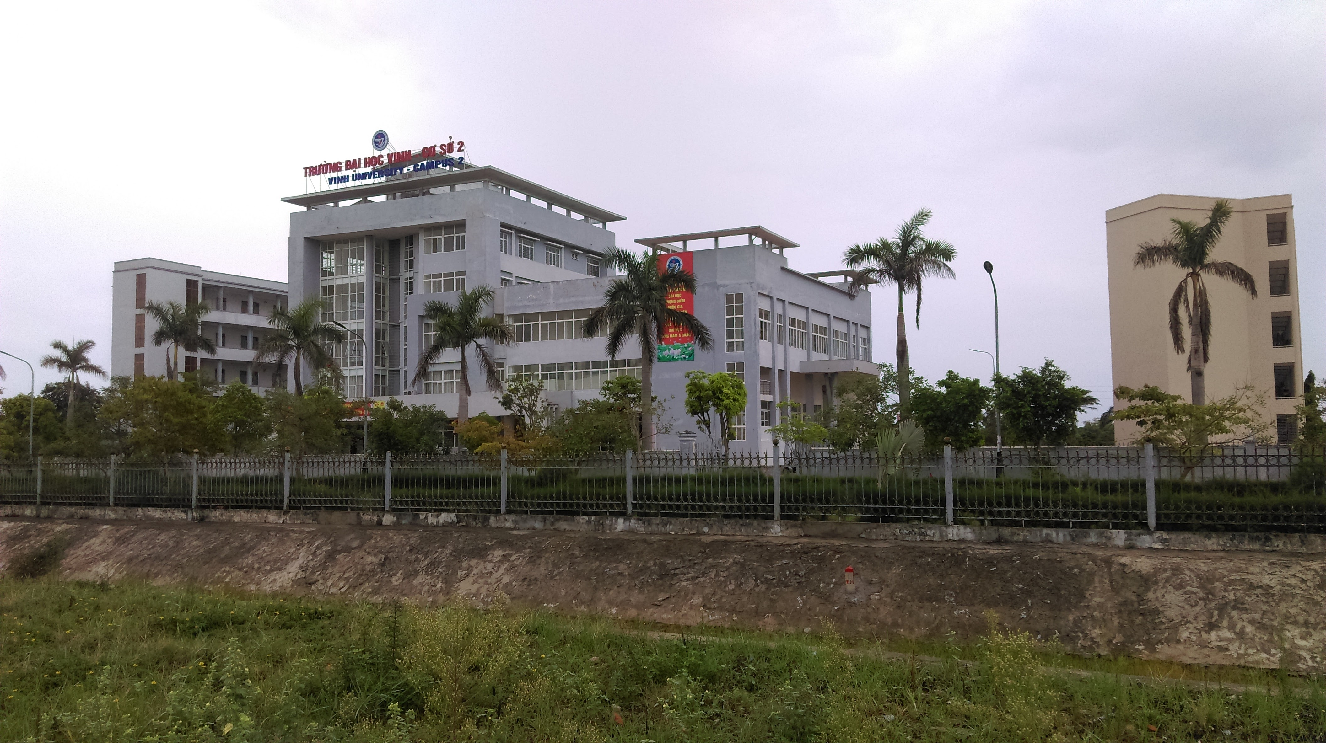 Trường Đại học Vinh - cơ sở 2, Nghi Phong, Nghi Lộc, Nghệ An